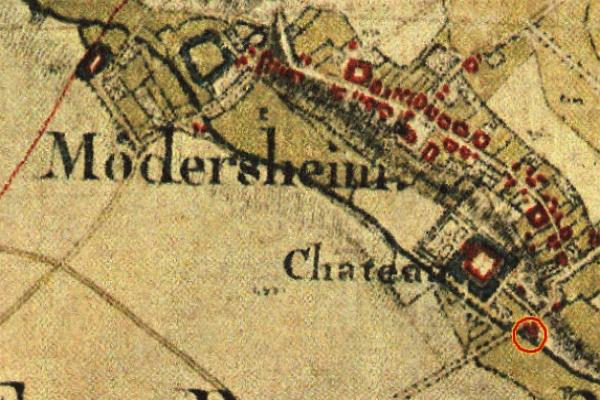 Kartenaufnahme der Rheinlande